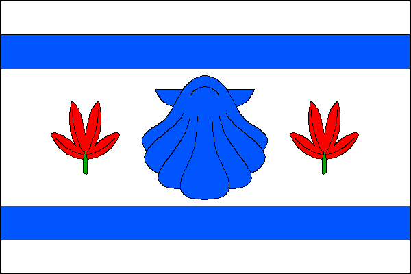 vlajka, Lesnice, okres Šumperk